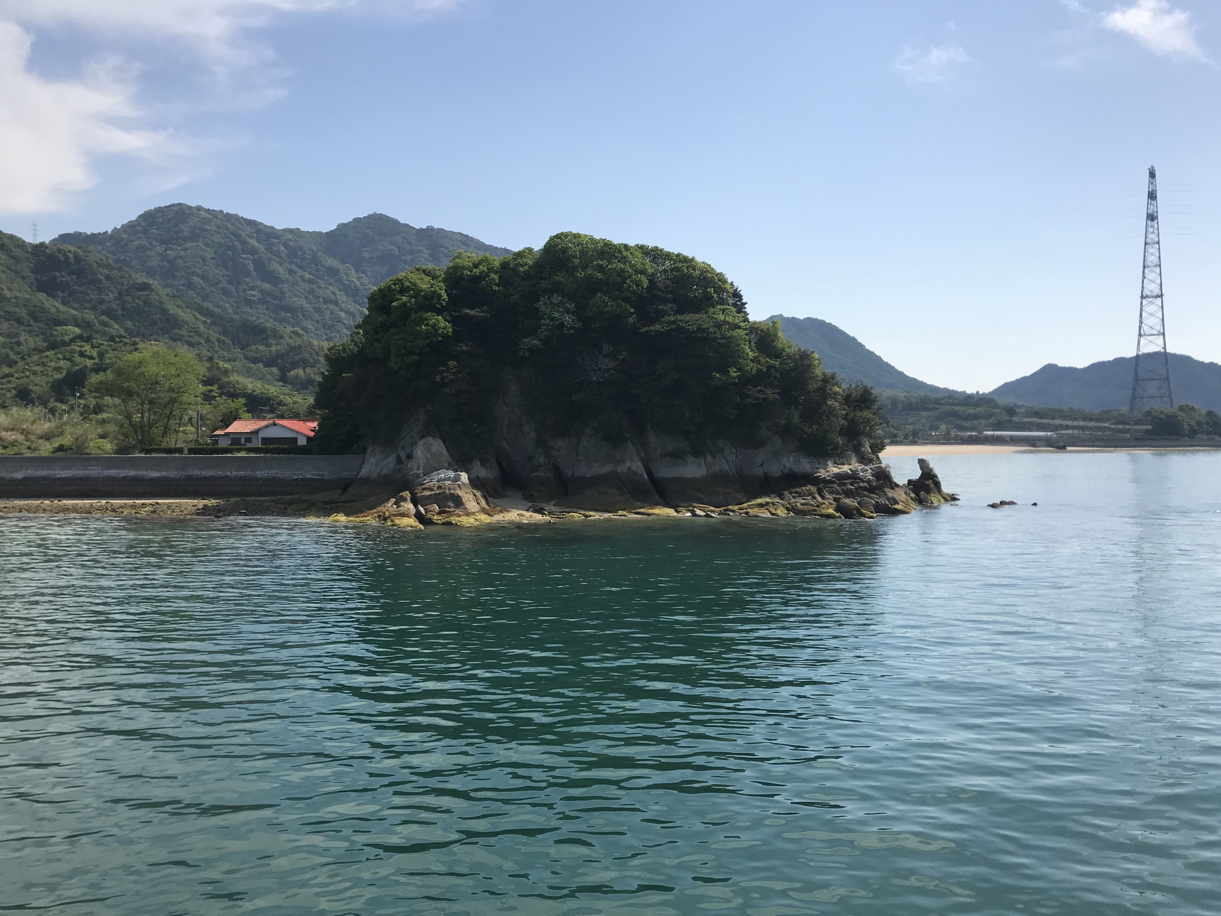 大三島フェリーより望む大三島北端の鳥取岬